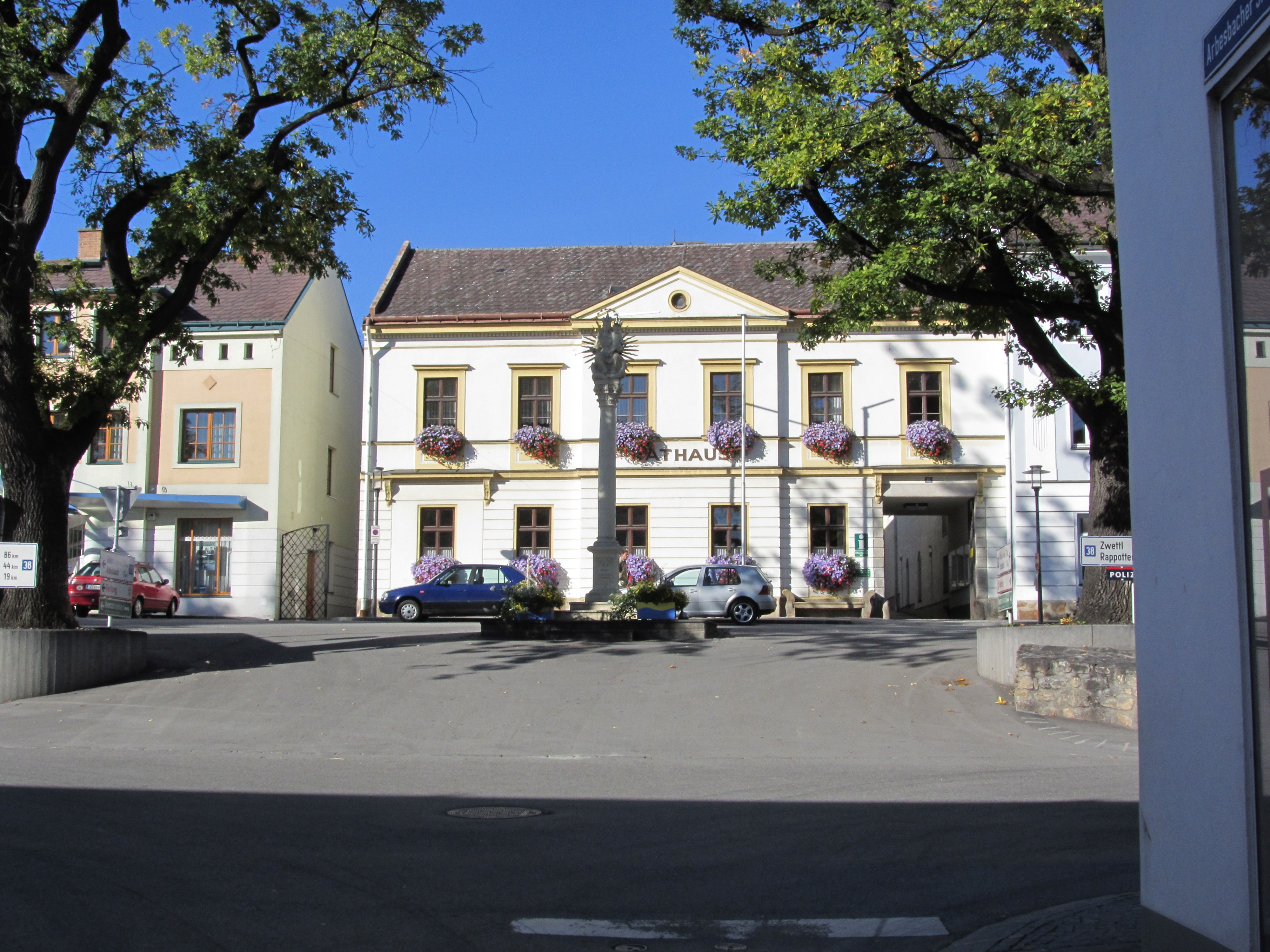 Rathaus im herbstlichen Blumenschmuck